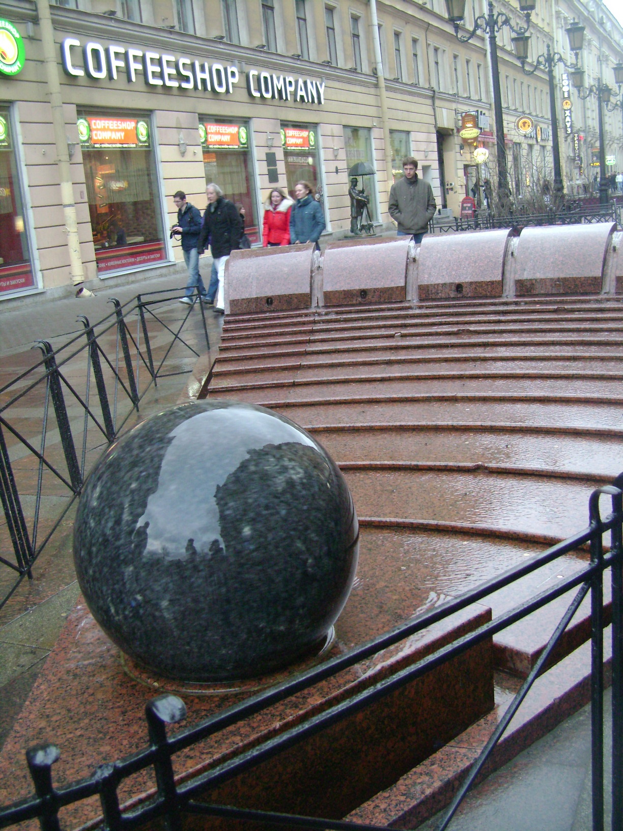 Фонтан на Малой Садовой. Санкт-Петербург.